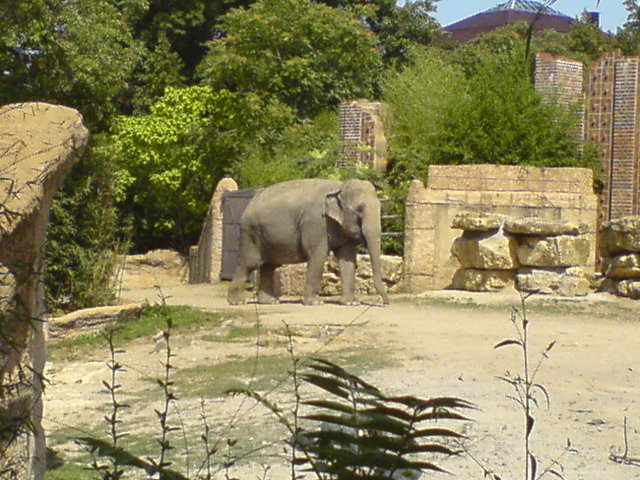 Elefantengehege im Leipziger Zoo (Elephant enclosure in Leipzig Zoological Garden)